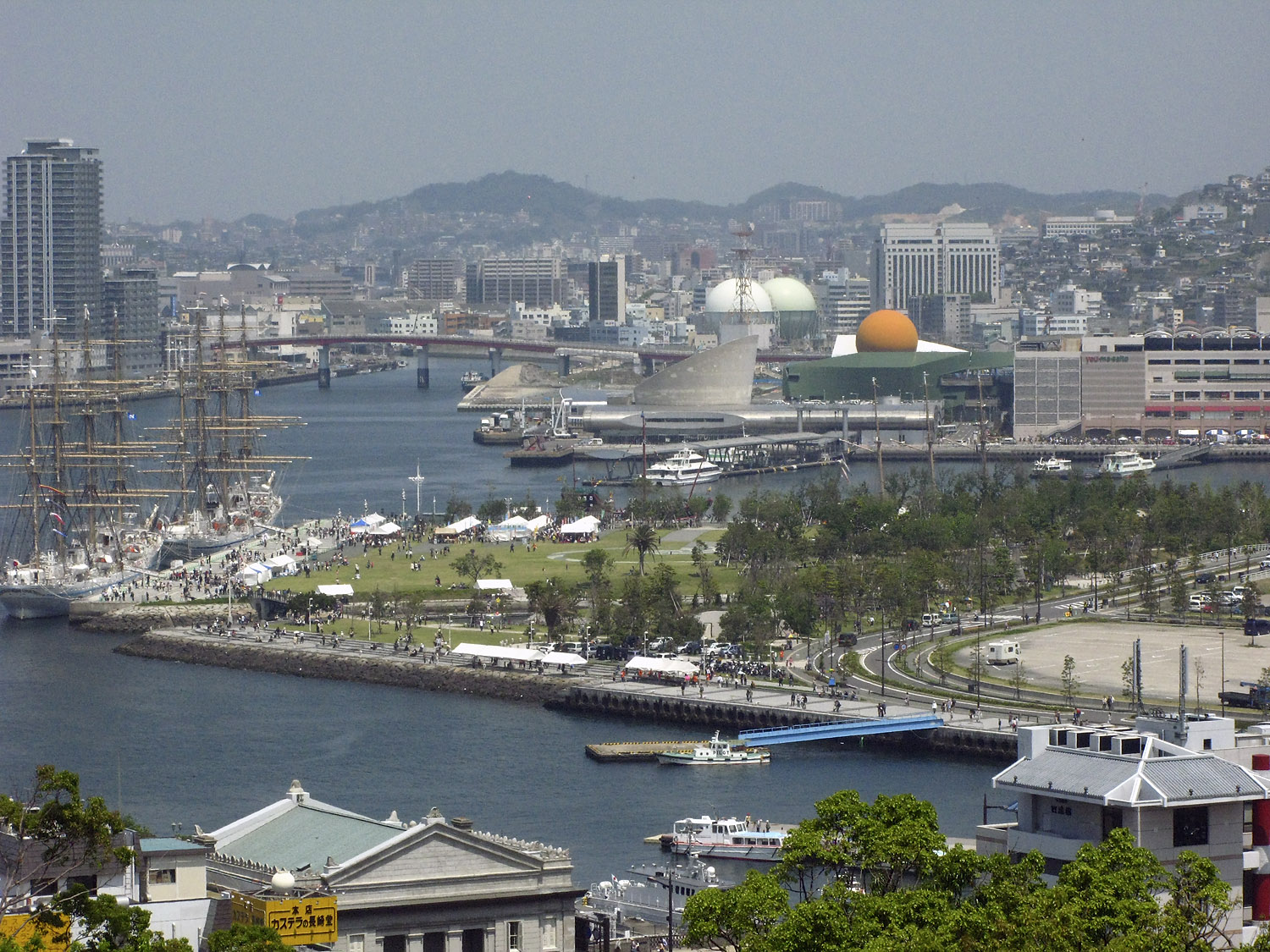 Waterfront in Nagasaki, Japan